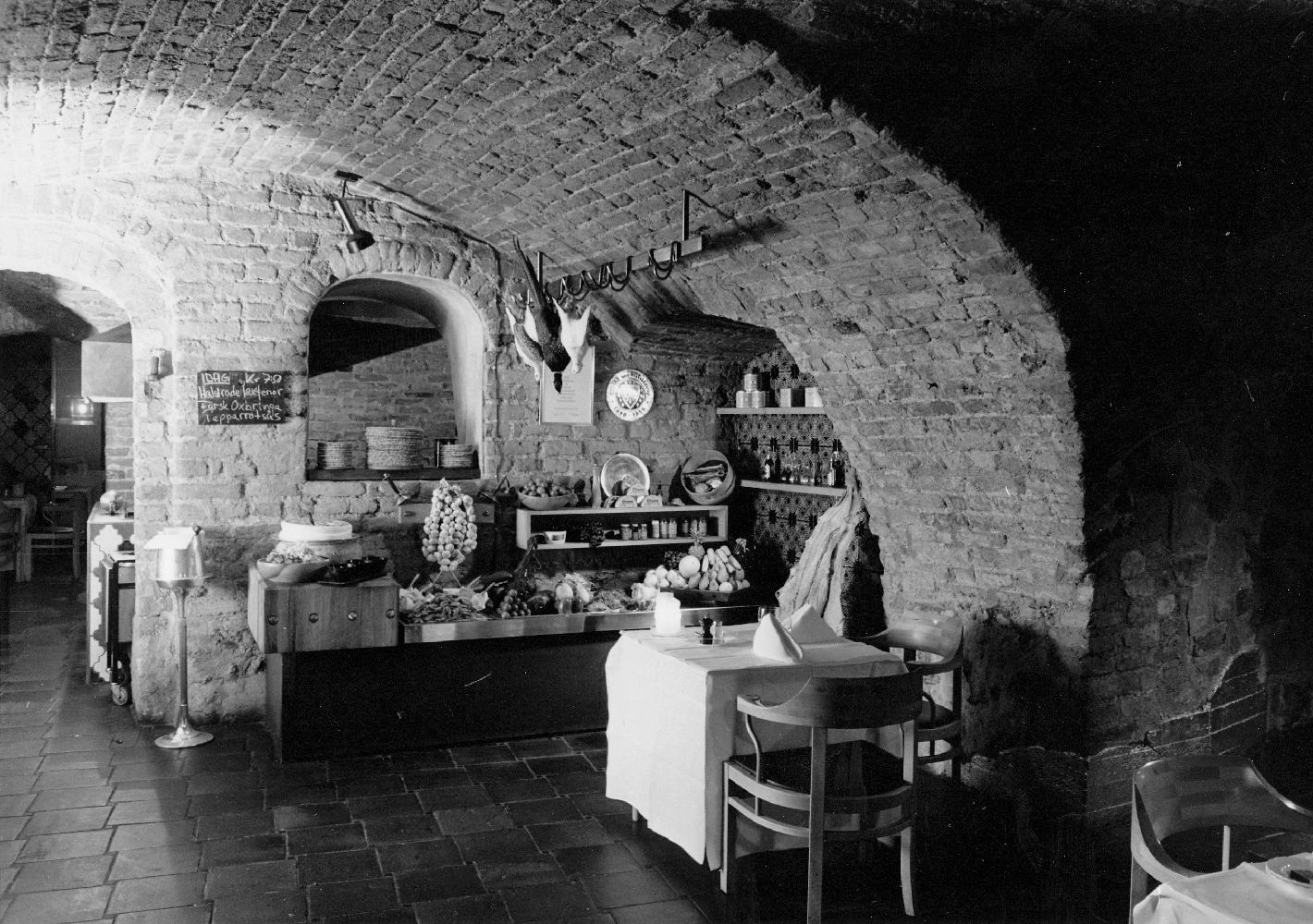 Källaren Aurora, källarvalven